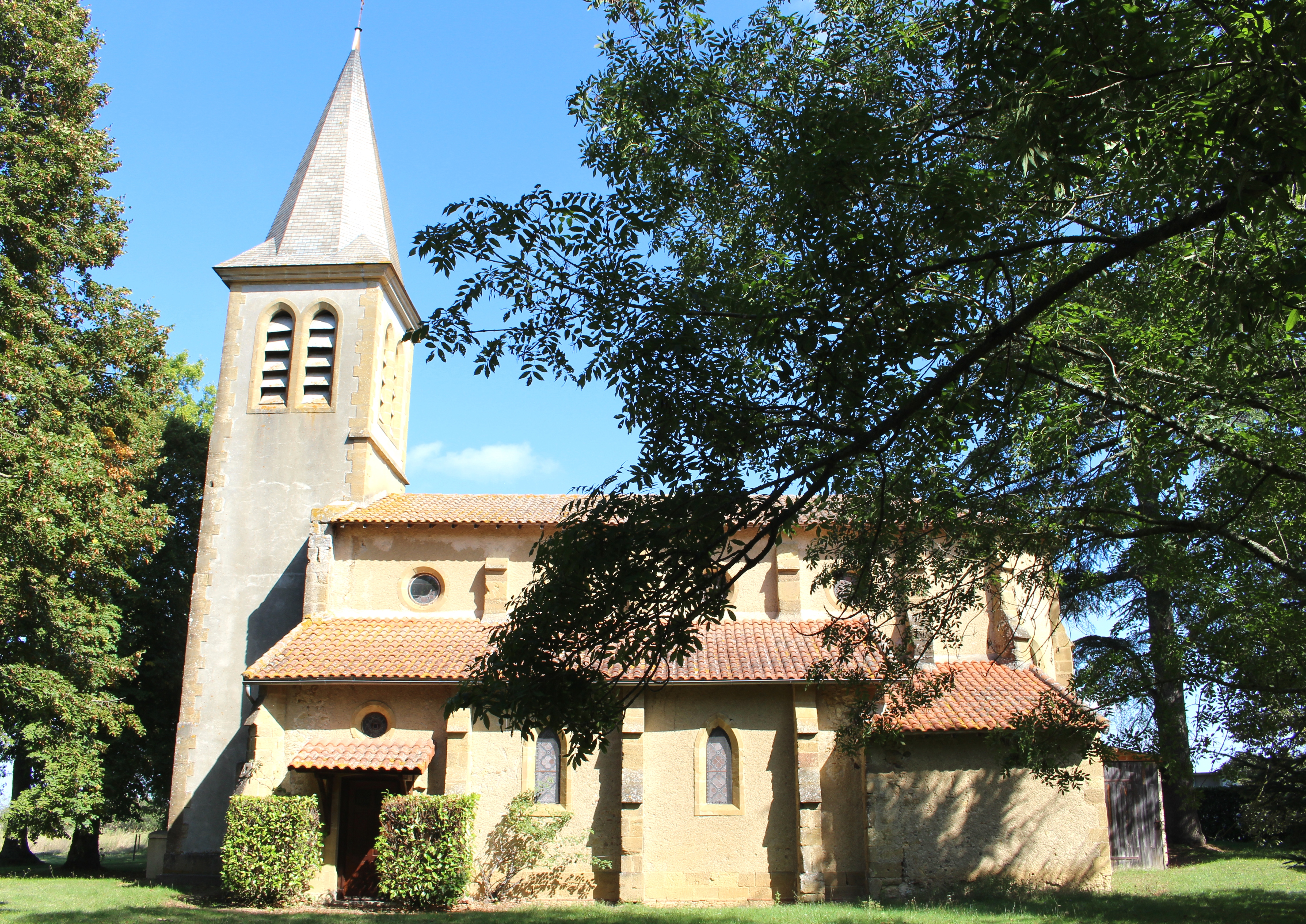 Église Saint-Jean-Baptiste de Betbèze (Hautes-Pyrénées)